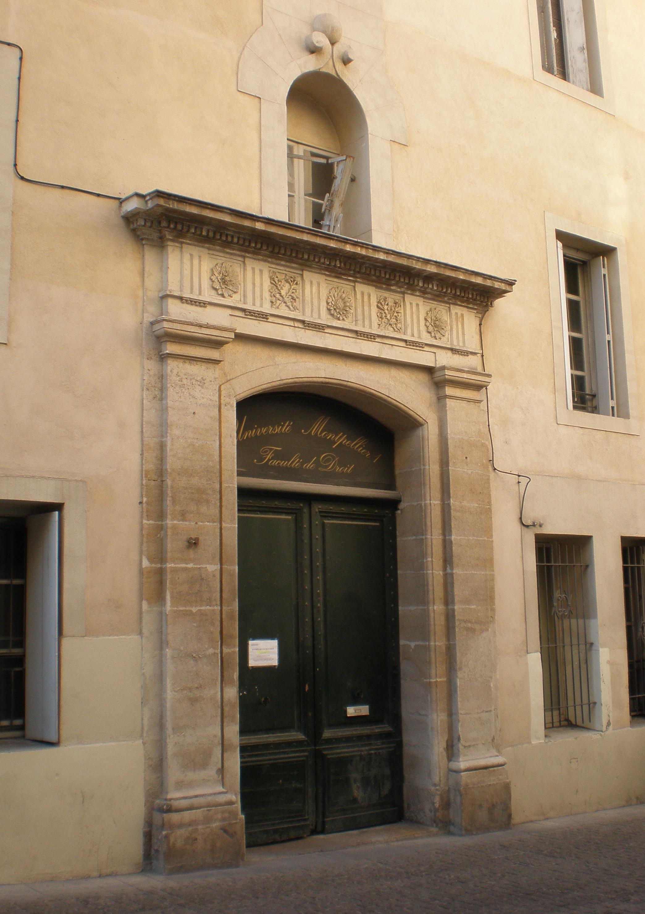 Entrée "historique" de la faculté de Droit de Montpellier à la rue de l'Université (Université Montpellier 1)